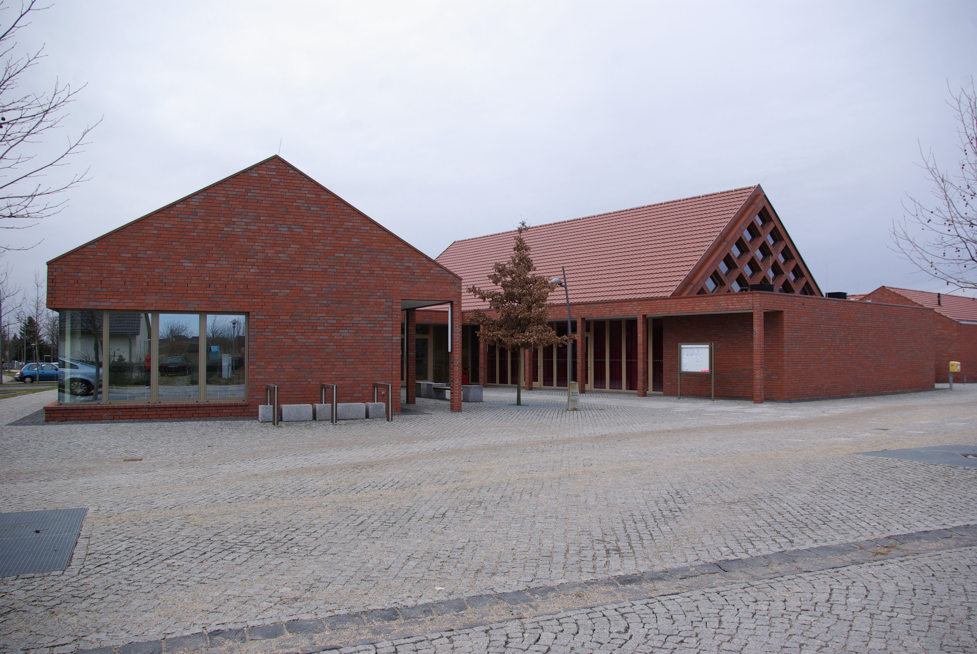 Königs Wusterhausen, Ortsteil Diepensee in Brandenburg. Der Ortsteil wurde 2003 erbaut. Er befand sich vorher in der Gemeinde Schönefeld und wurde wegen des Ausbaus des Flughafens BER hier hin verlegt (geotags in den exif-daten.